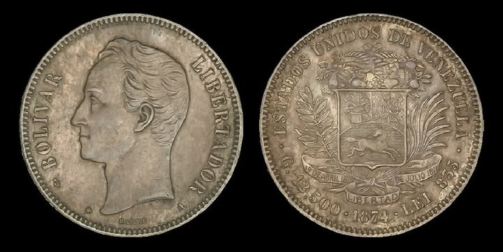 50 Centavos de Venezolano (Bamba) 1874